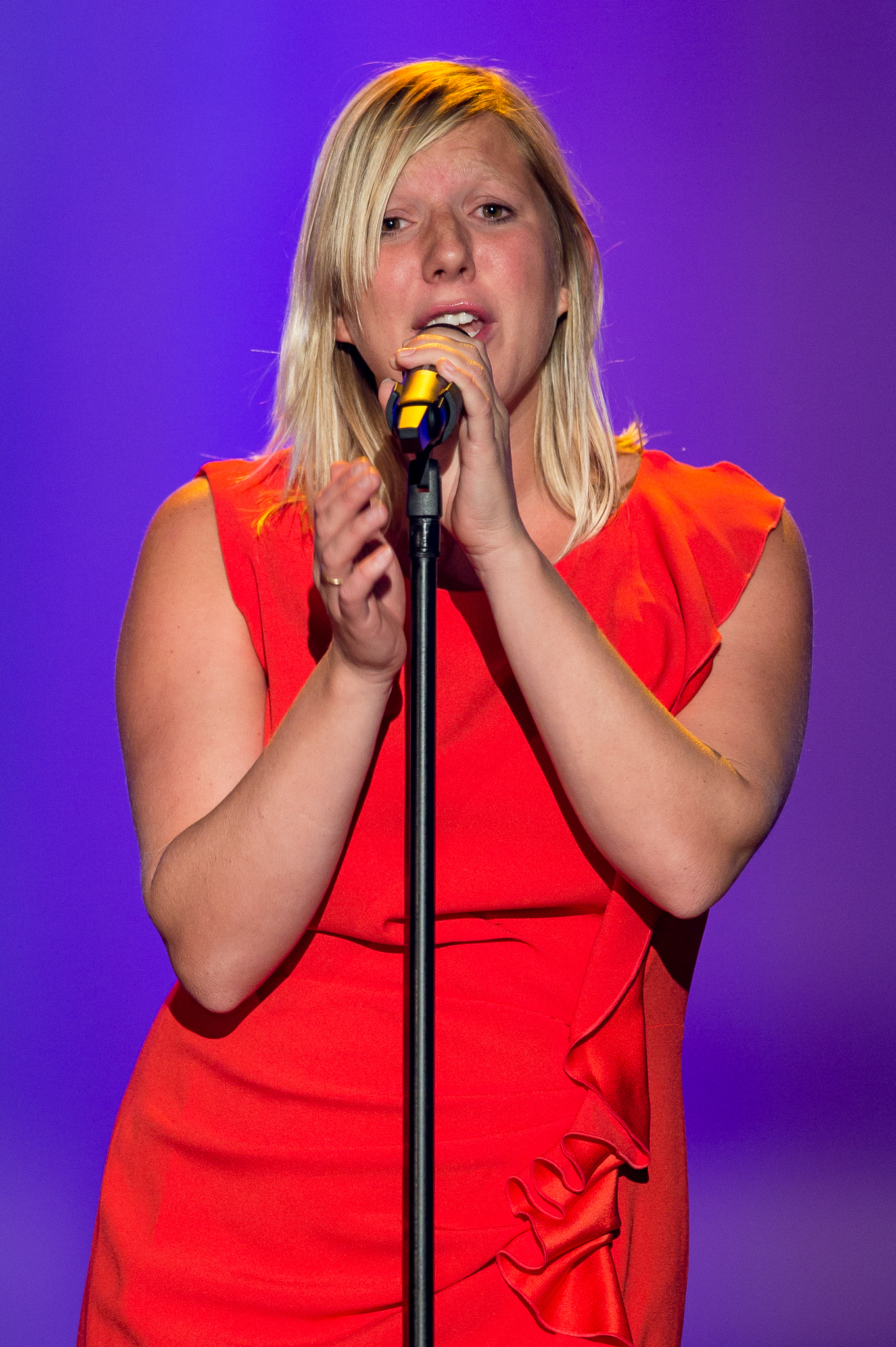 BR,Bayerisches Fernsehen,Claudia Koreck,Frankenhalle,Live-Sendung,Sternstunden-Gala,Sternstundengala